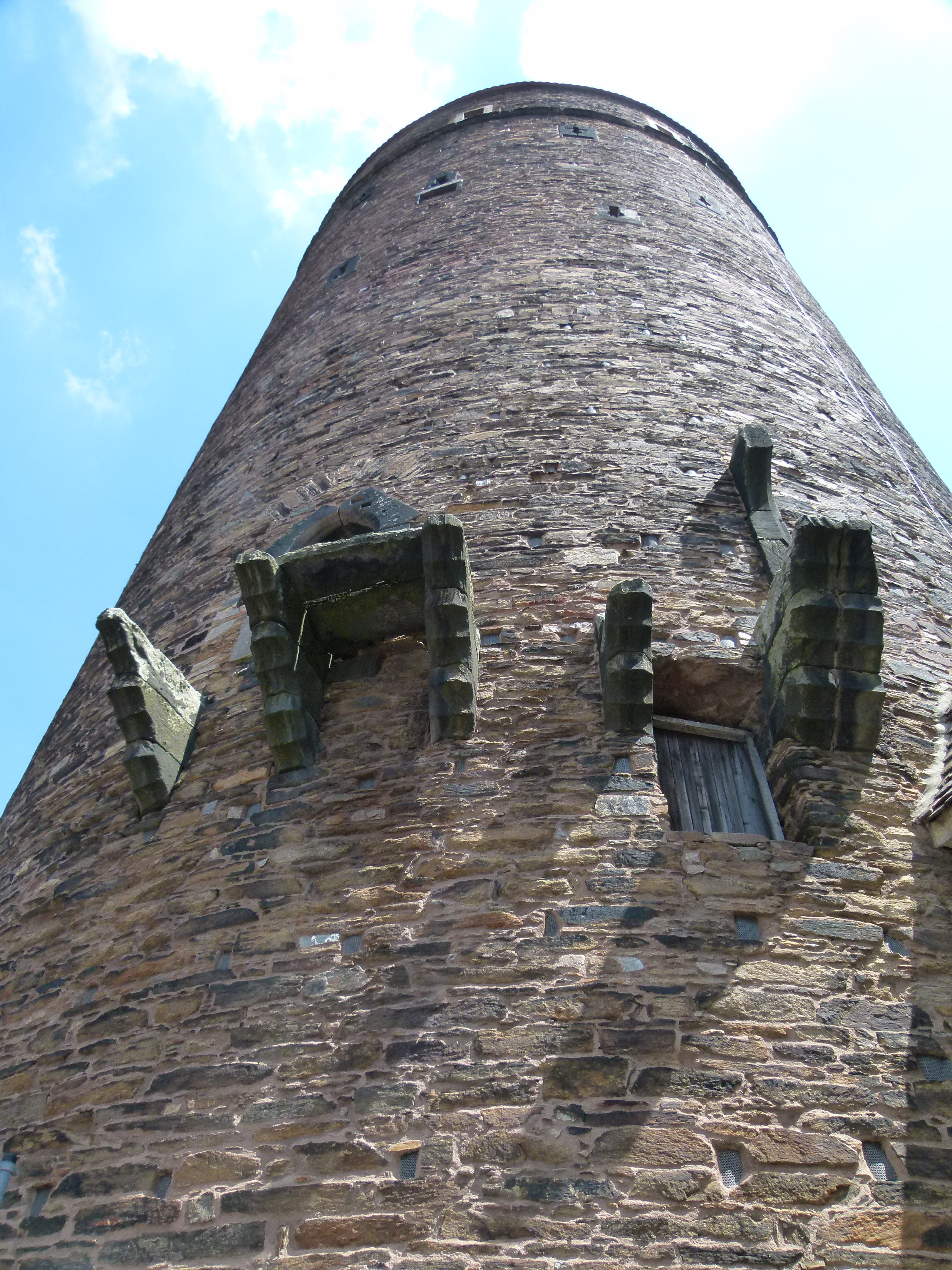 Donatsturm, Freiberg, Sachsen